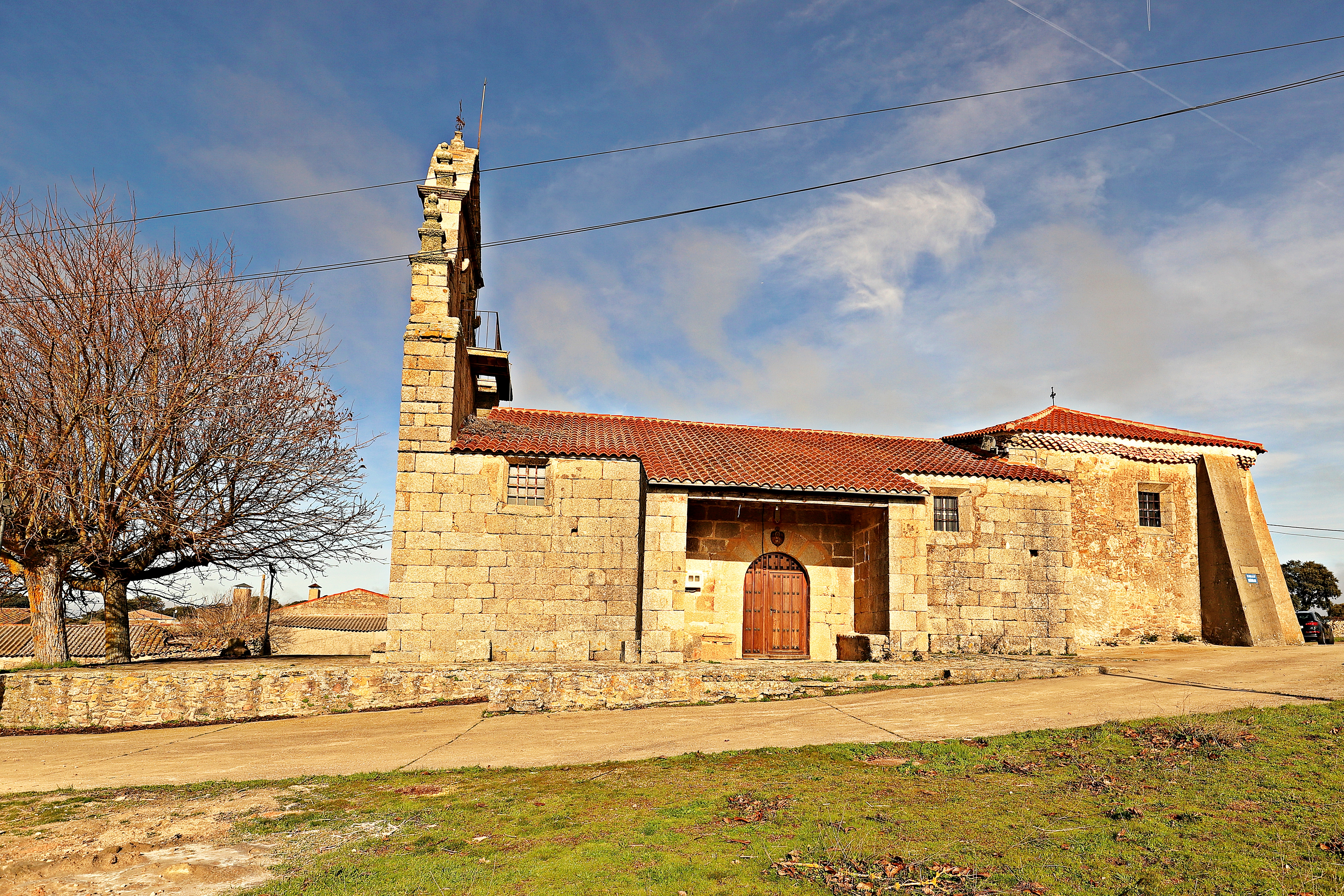 Espadaña